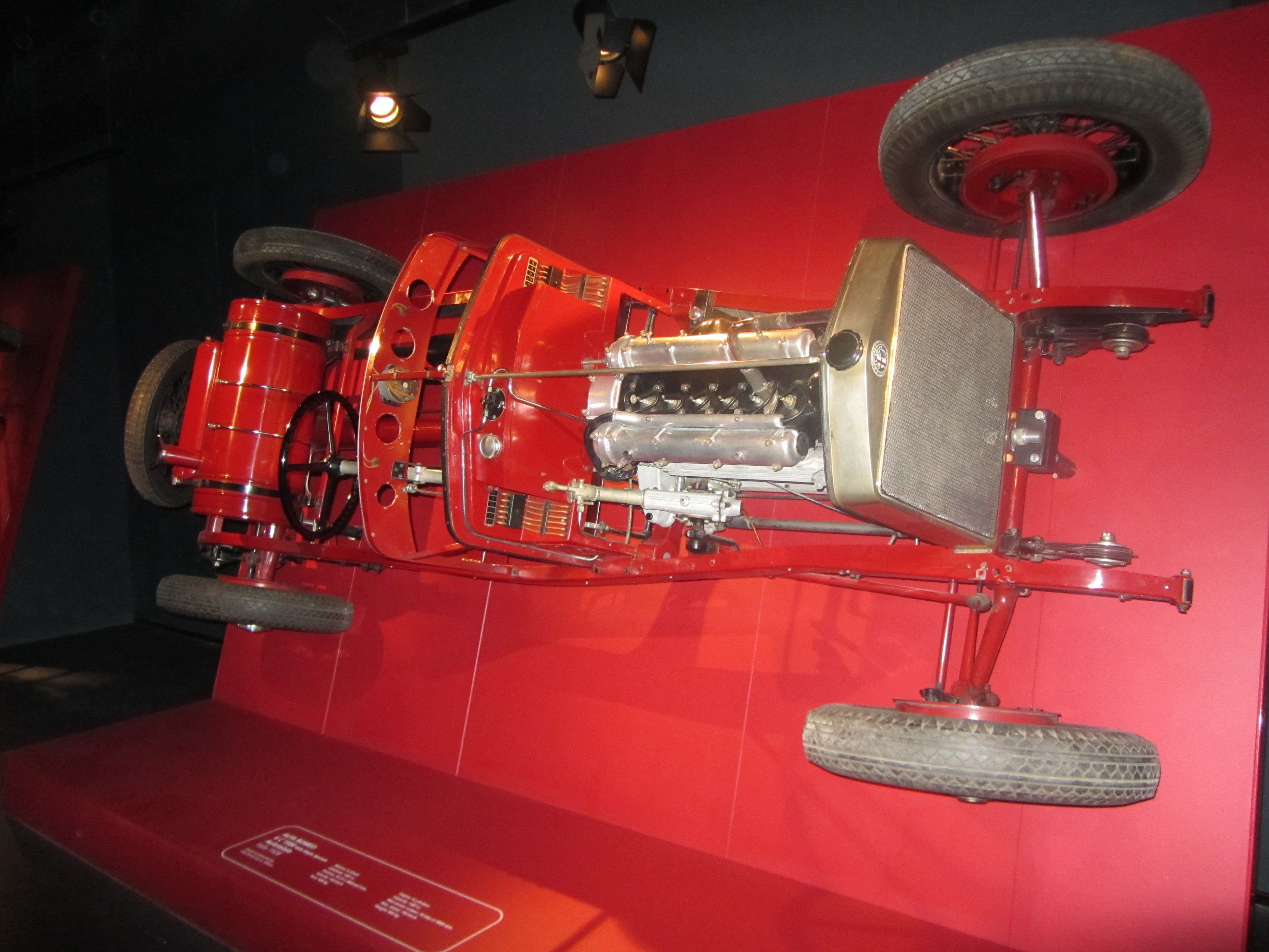 Alfa Romeo autotelaio 6C 1500 "Mille Miglia Speciale" Italia: 1928 Motore: 6 cilindri 1487 cc 76CV a 4800giri Vel Max: 160Km/h peso: 860 kg